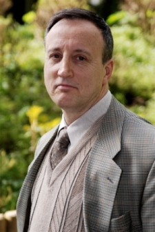 L'homme politique belge du Front national Jean-Pierre Borbouse en avril 2008.